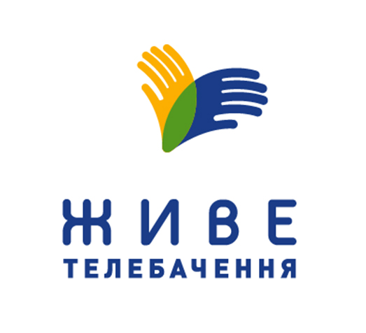 Логотип та зображення Живе телебачення.